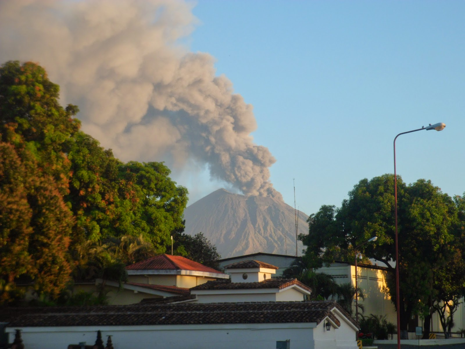 Volcan San Cristobal